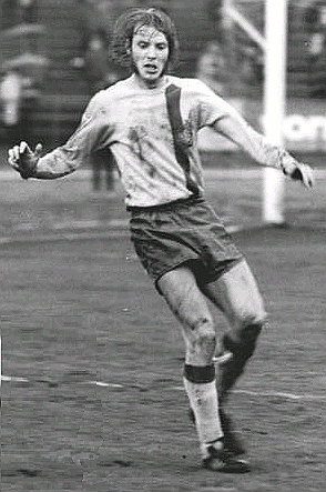 Title: BFC Dynamo Berlin - 1. FC Lok Leipzig 3:1 Factual corrections and alternative descriptions are encouraged separately from the original description. Additionally errors can be reported at this page to inform the Bundesarchiv. Original historic description: ADN-ZB-Lehmann-19.10.74-pe-Berlin: Fußball-Oberliga - Der BFC Dynamo Berlin gewann am 19.10.74 bei einem Heimspiel gegen den 1. FC Lok Leipzig 3:1. Unser Foto zeigt den BFC-Spieler Terletzki (links) im Angriff gegen den Leipziger Sekora.